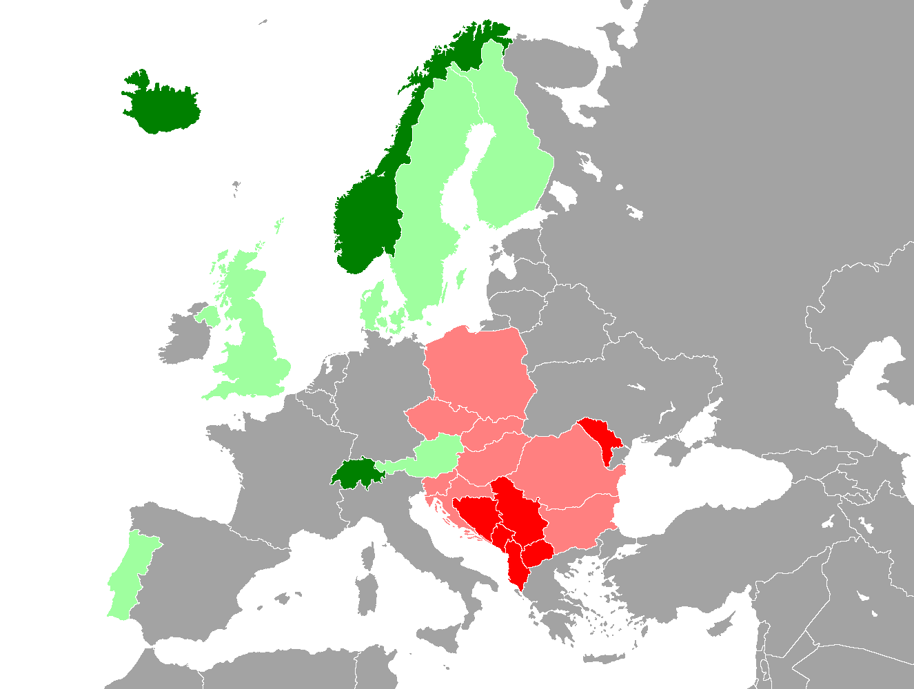 EFTA & CEFTA2013